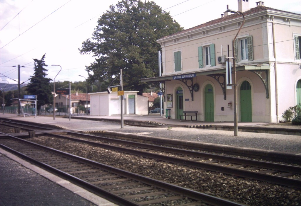 Gare de la Penne-sur-Huveaune (Bouches-du-Rhône), vue générale (bâtiment, voies et quais)